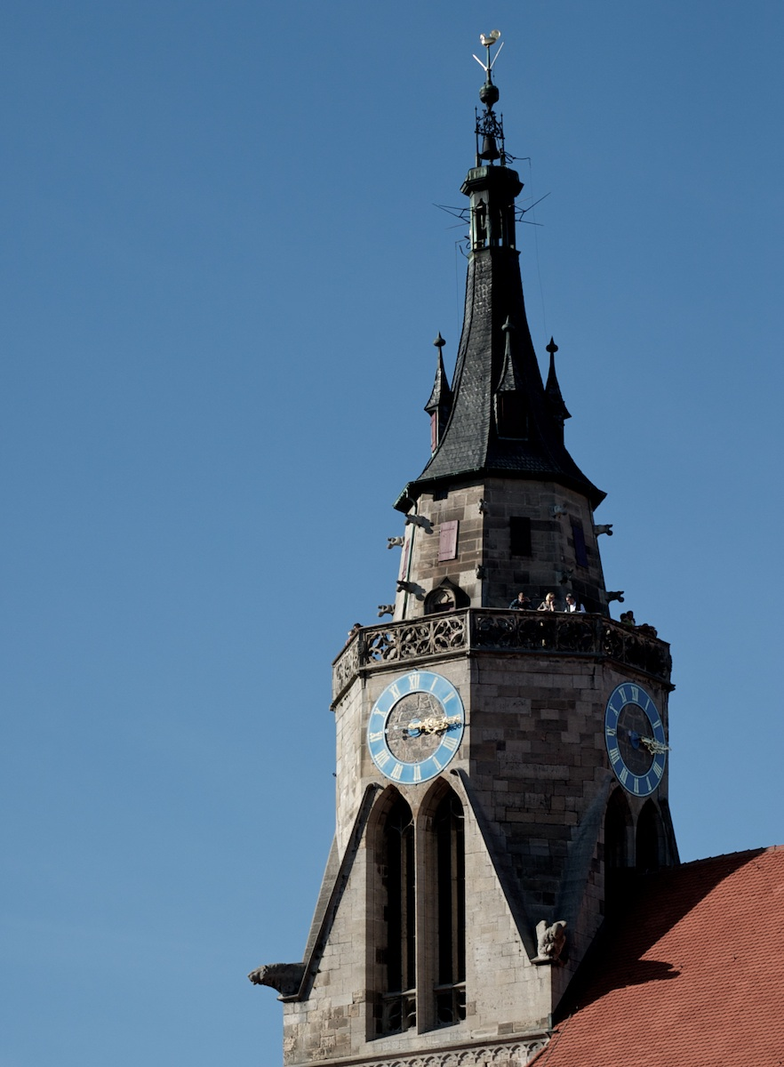 Kirchturm der Tübinger Stiftskirche